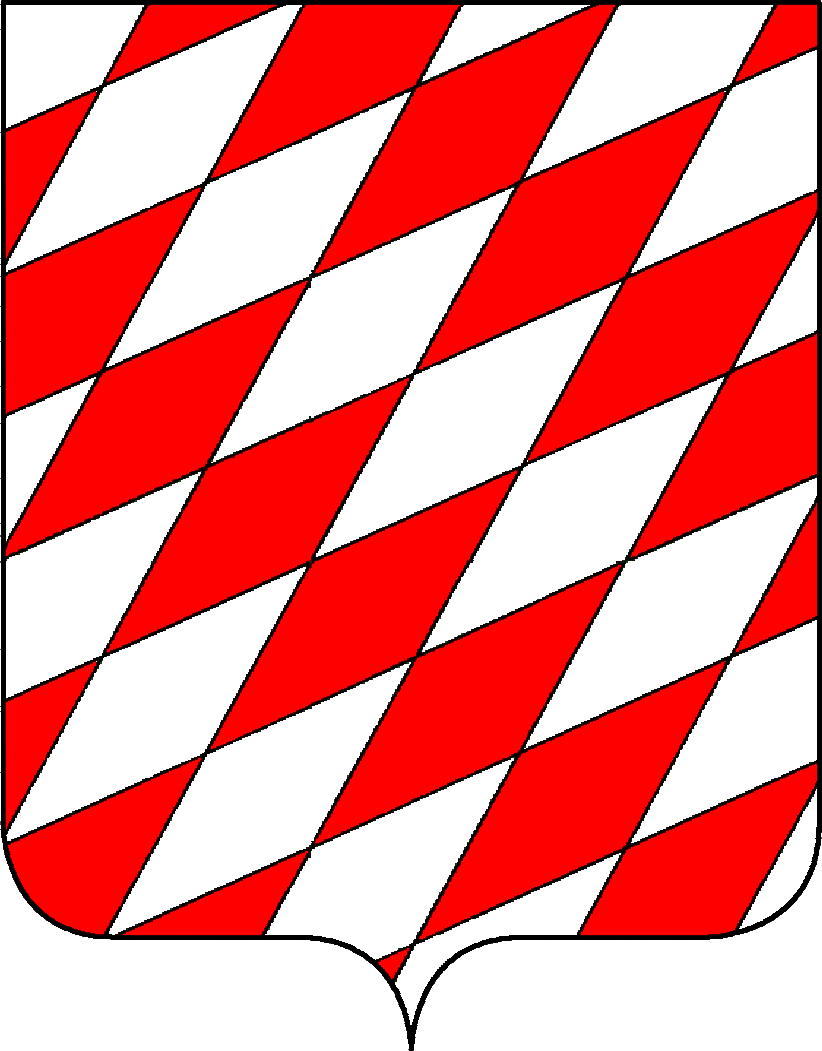 Stemma della famiglia Salamon, appartenente al patriziato di Venezia.